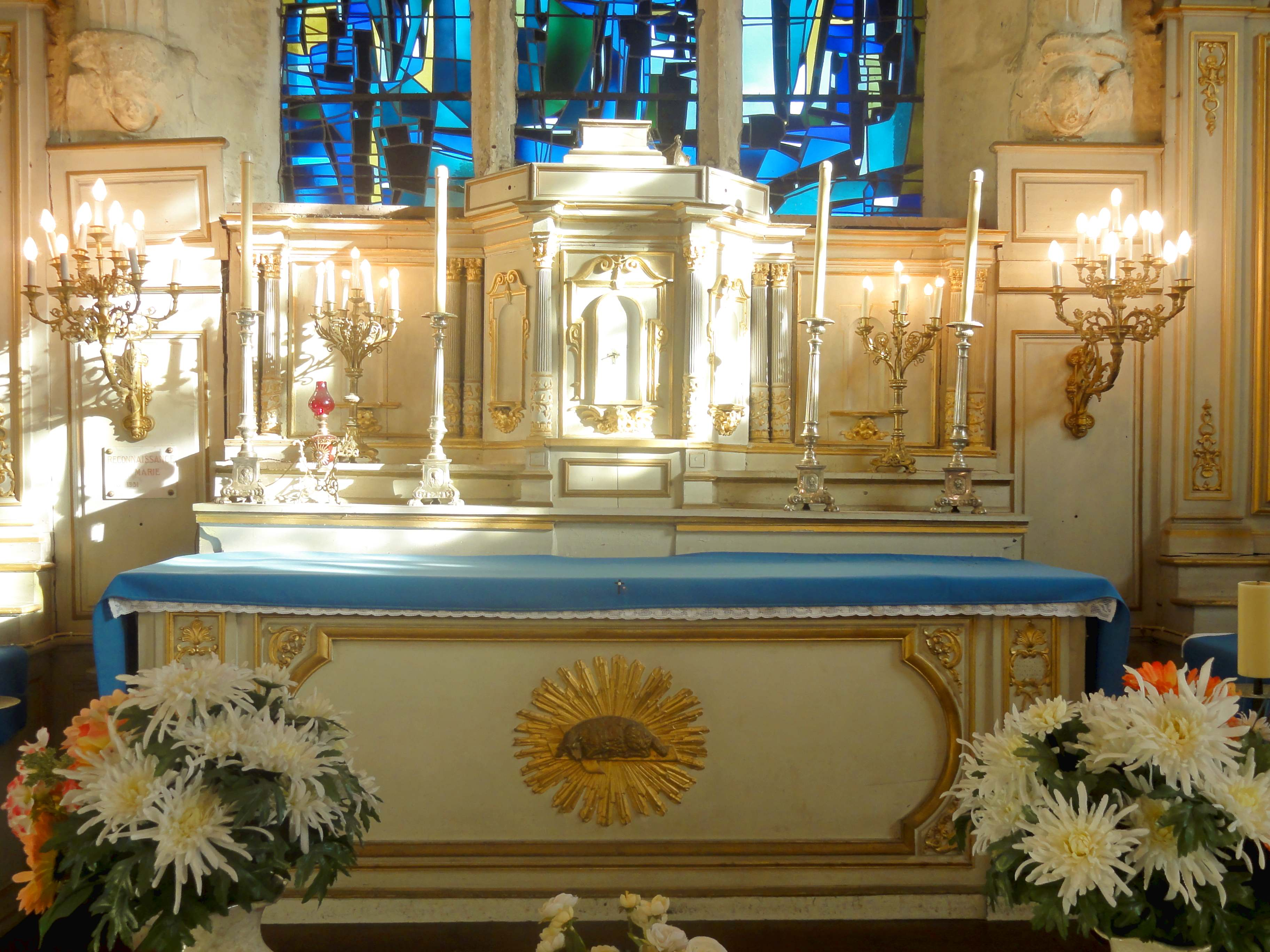 Maître-autel et tabernacle, XVIIIe s. Serait classé M.H.